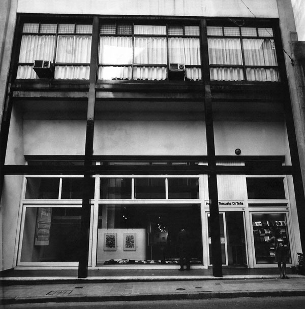 Calle Florida 936 - Buenos Aires